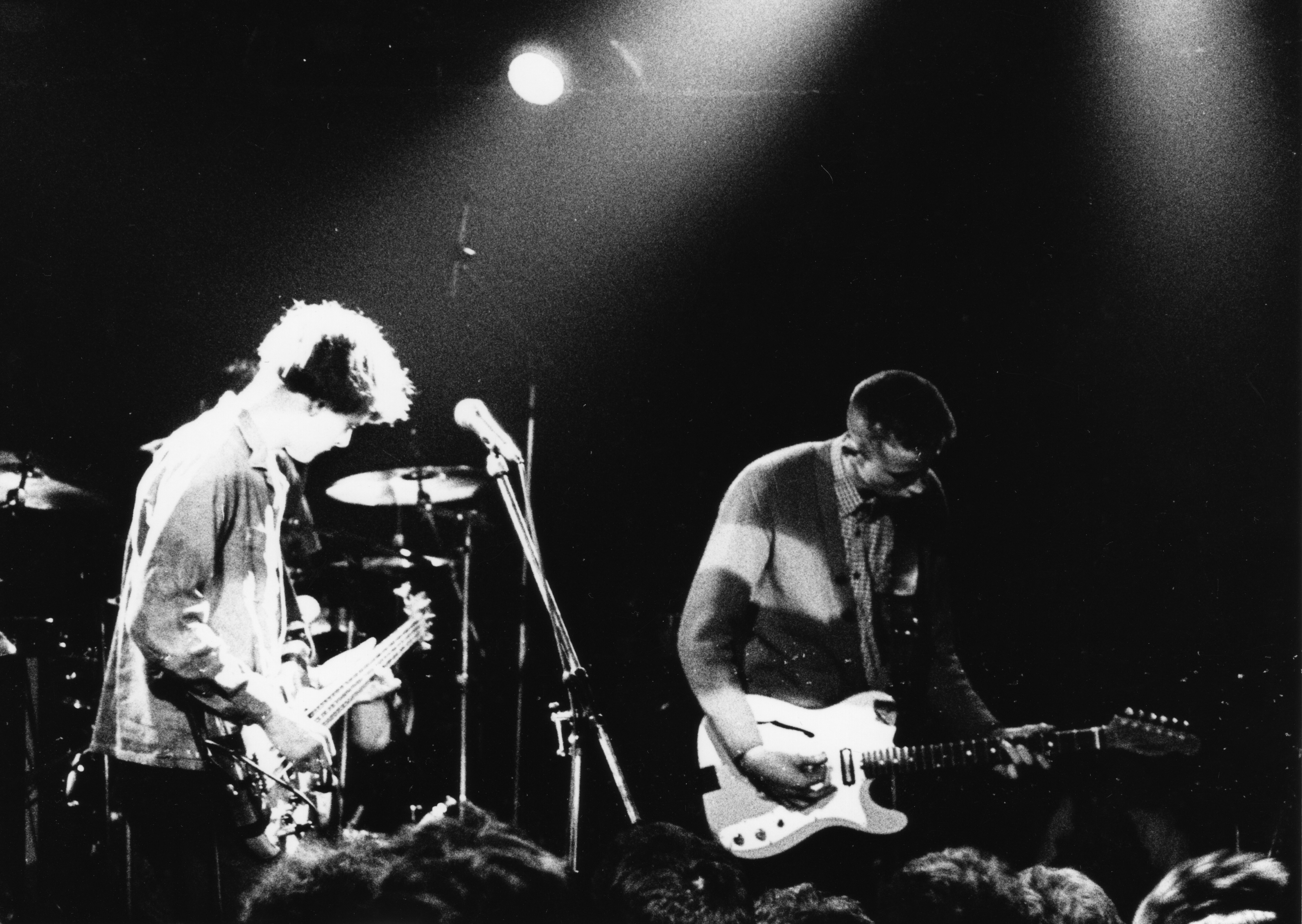 Pale Saints en concert à l'Ubu de Rennes en avril 1990